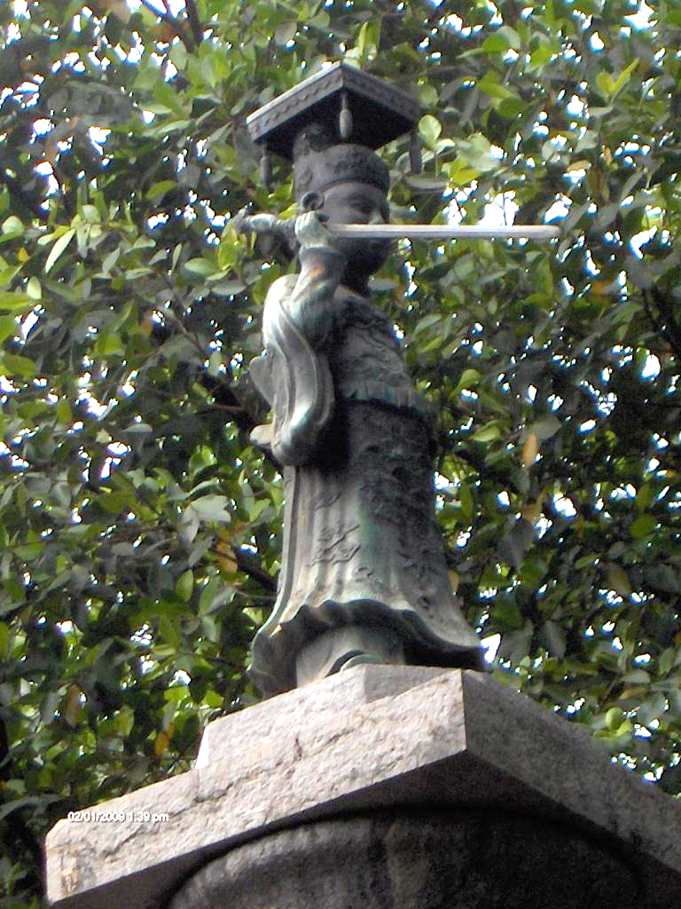 Tượng đài vua Lê Thái Tổ, công trình văn hóa-tưởng niệm để ghi nhớ công lao vị anh hùng dân tộc Lê Lợi (1385-1433), người đã lãnh đạo cuộc kháng chiến đánh đuổi quân Minh, giải phóng đất nước vào thế kỷ 15. Tượng đài này được dựng vào khoảng năm 1896 cạnh hồ Hoàn Kiếm, Hà Nội, gắn với truyền thuyết trả gươm thần